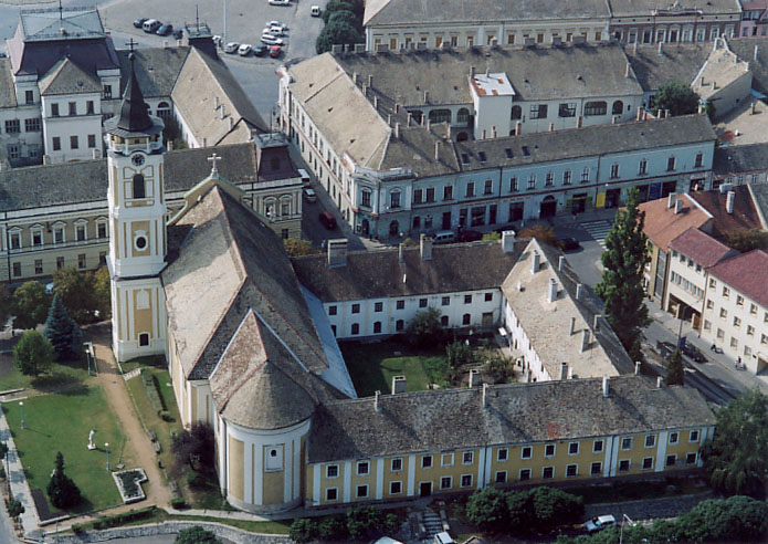 Baja - Hungary - Europe